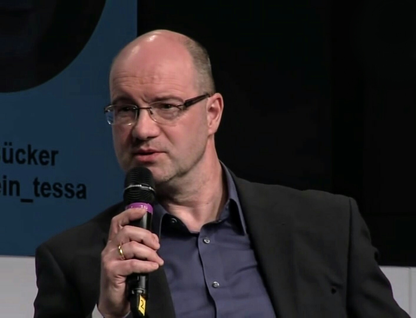 Find out more at: Wir müssen reden, über das aktuell brennende Thema: "Von Human Resources zu Human Relations -- wie sieht die Arbeit der Zukunft aus?" Und das ohne Herrenwitze und Dauermattscheibengrinsen. Jeden Sonntag nach dem Tatort bleibt die Hälfte des Publikums doch vor dem Fernseher hängen und quält sich durch die Talkshow von Jauch. Meistens ist anhand der Gästeliste schon im Vorfeld absehbar, wer welche platten Thesen vertreten wird und dass diese Sendung nur schwer nüchtern durchzustehen ist. Jeden Sonntag sagen zahlreiche Stimmen im Internet: Das geht doch besser! Stellt euch mal vor, da ist eine Talkshow mit einem ähnlichen Thema, aber anderen Gästen! Und einer Moderation, die ohne Herrenwitze auskommt. "Ohne Jauch geht's auch" ist eine interaktive Talkshow, die das Publikum mitgestalten kann, indem es verschiedene Fragen an das Podium richtet und auch live während der Show nachhak... Sue Reindke | | Joachim Hasebrook | | Teresa Bücker | | | Anke Domscheit-Berg | | | Stefan Sell | | | Anna-Mareike Krause | Tilo Jung | | | Creative Commons Attribution-ShareAlike 3.0 Germany (CC BY-SA 3.0 DE)